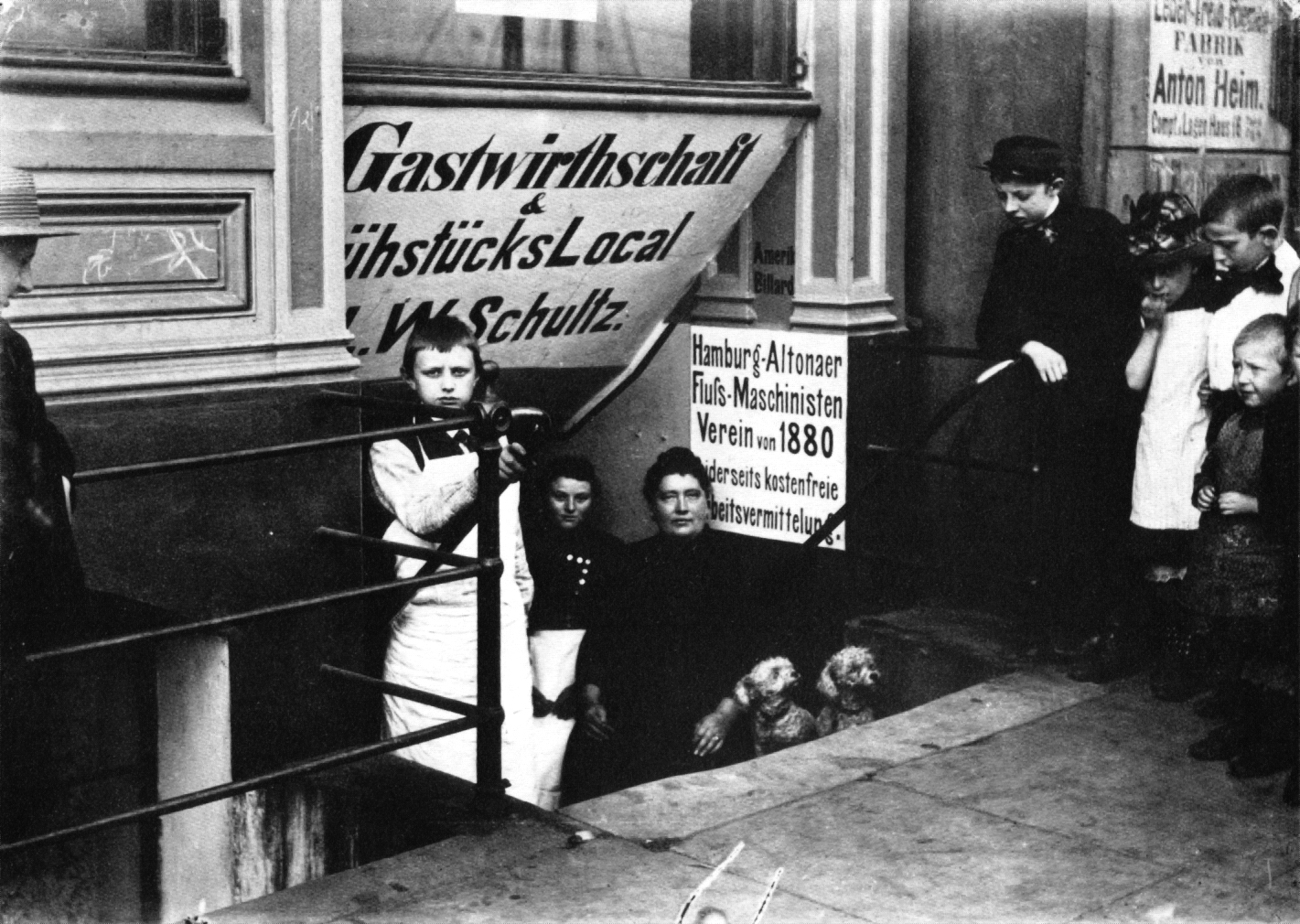 Hamburg 1899: „Gastwirtschaft & FrühstücksLokal L.W. Schultz“ in der hafennahen Straße „An den Vorsetzen“. Diese Hafenkneipe diente wie viele andere als Arbeitsvermittlungsstelle, hier für den „Hamburg-Altonaer Fluß-Maschinisten Verein von 1880“. Flussmaschinisten hielten in der Regel deutlich Abstand zur sozialdemokratischen Gewerkschaftsbewegung.